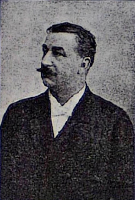 Karel Mert (1859-1936) rakouský a český politik